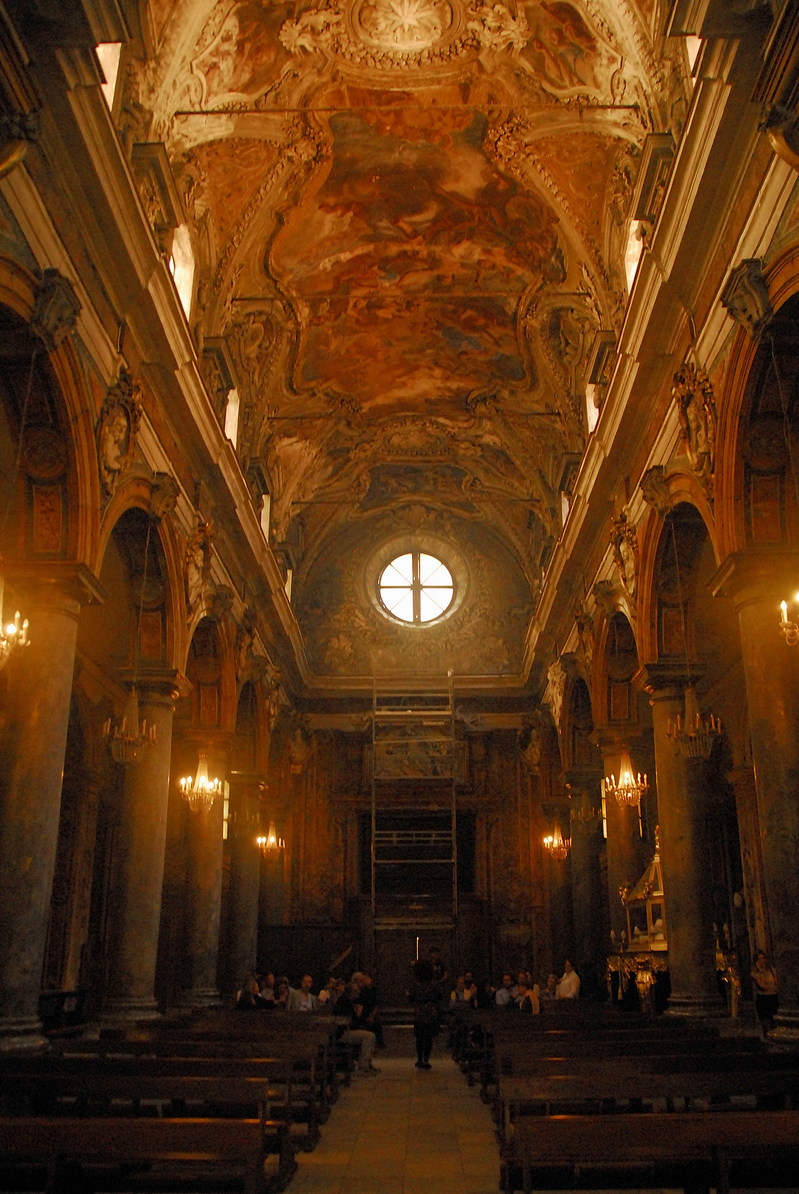 Palermo, ITA